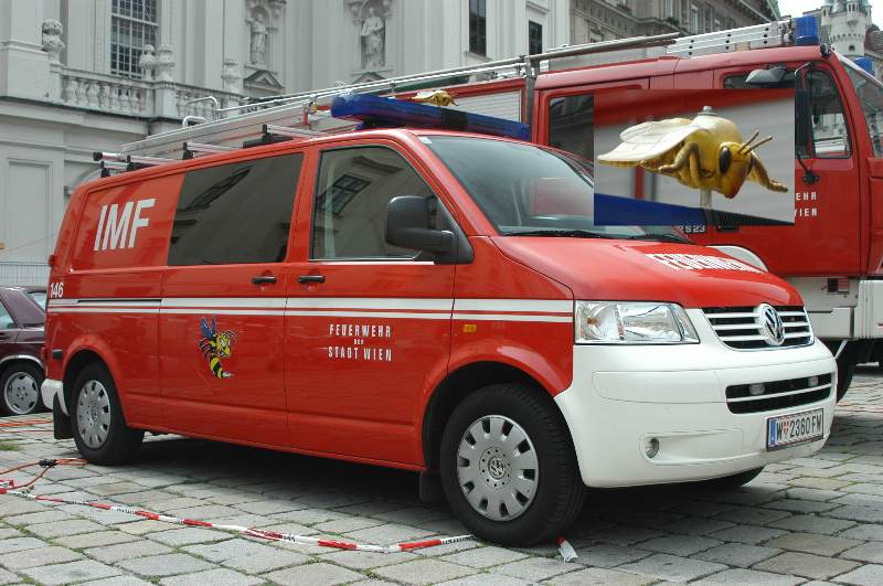 Fahrzeug der Feuerwehrimker der Berufsfeuerwehr Wien mit Biene am Blaulicht